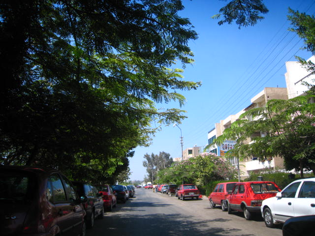 Cairo, Egypt